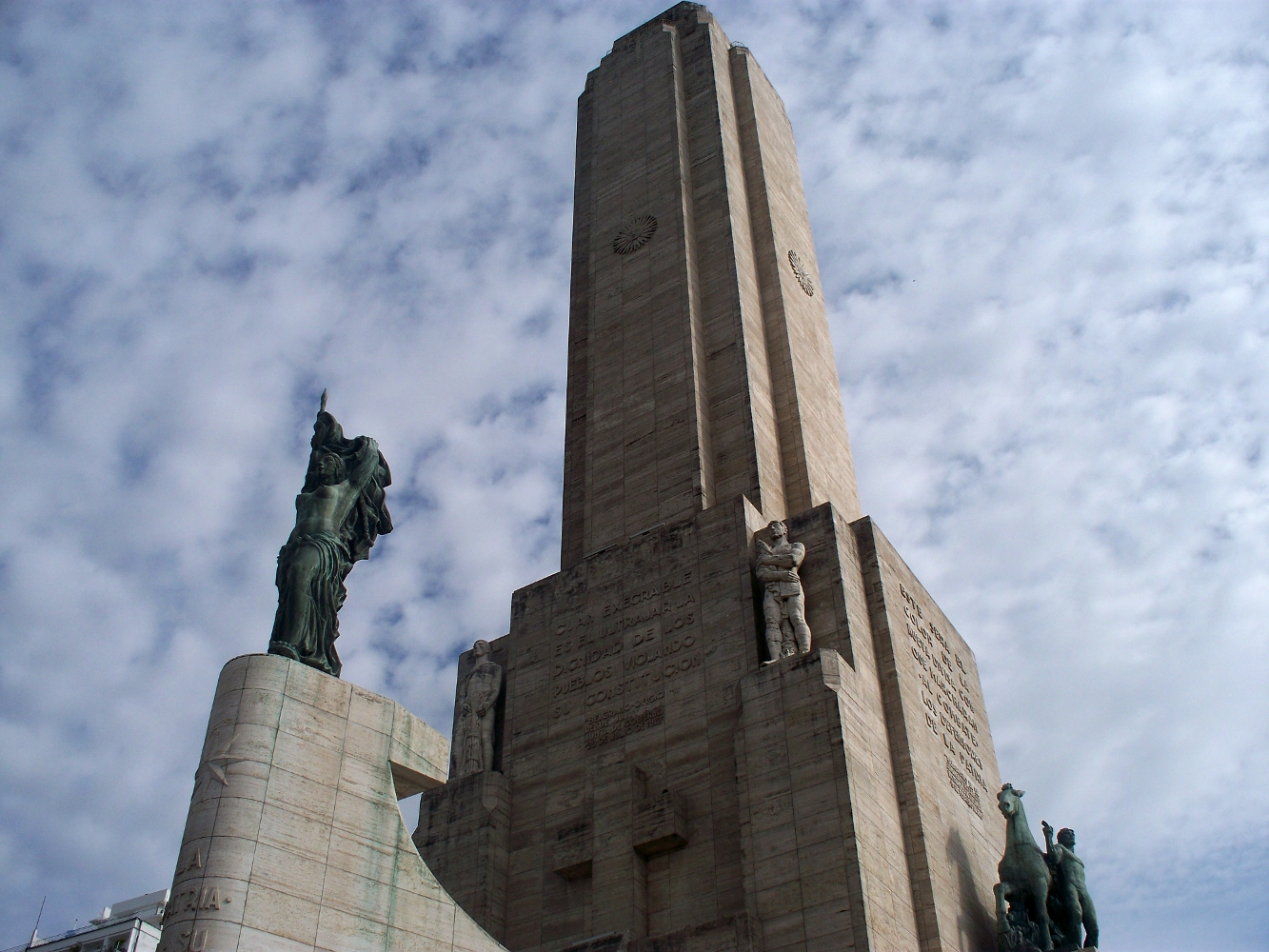 Extremo del monumento a la creacion de la bandera argetina en su parte mas alta